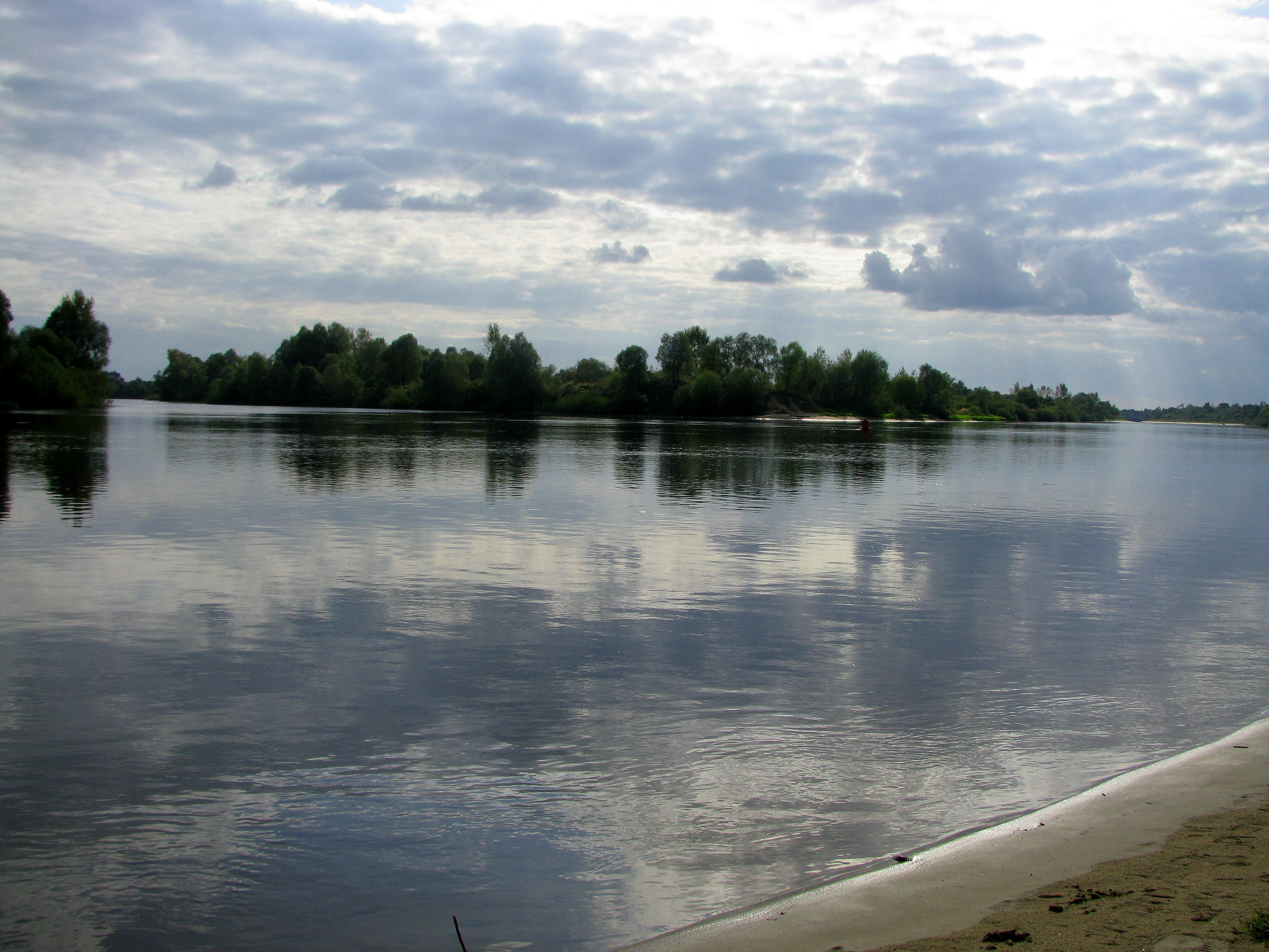 Припять недалеко от Лунинца